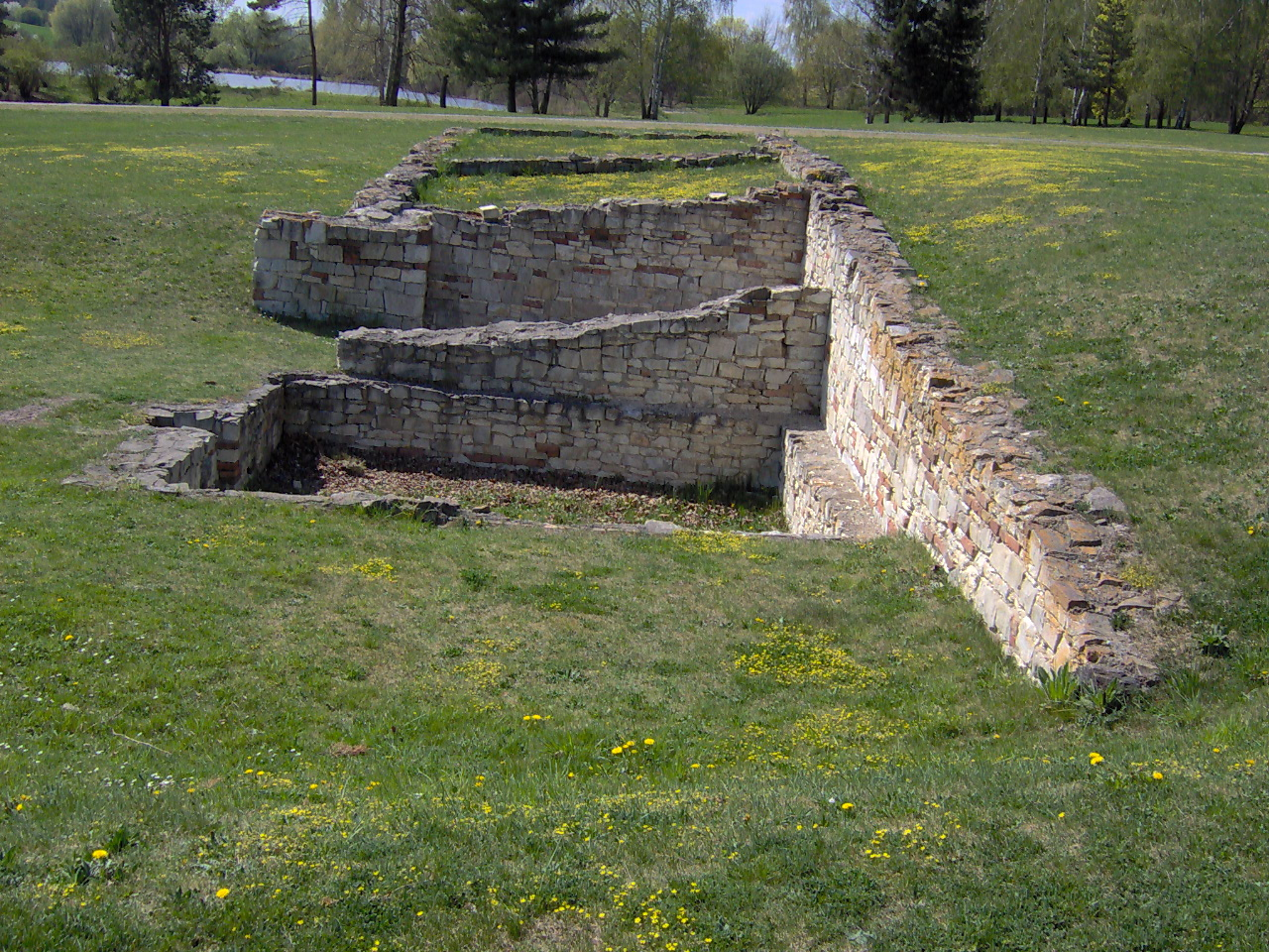 Základy Horákova statku